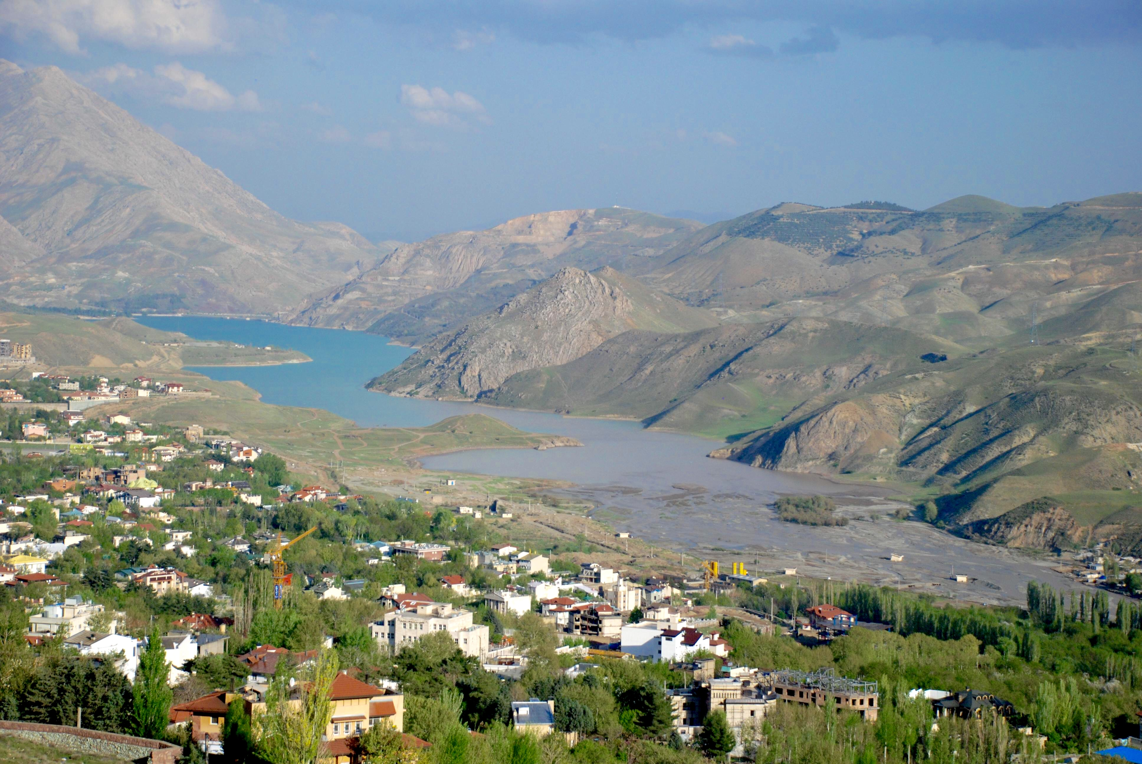 Lavasan